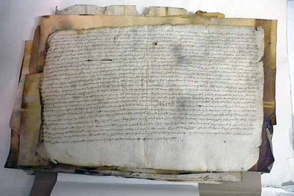 El document més antic del fons Ajuntament de Palafrugell, un pergamí datat el 30 de setembre de 1115 (AMP). Pactes entre Dalmau Bernat i el comte Ramon i la comtessa Almodis sobre el castell de Begur. És trasllat sense data ni notari. 22 x 35 cm.